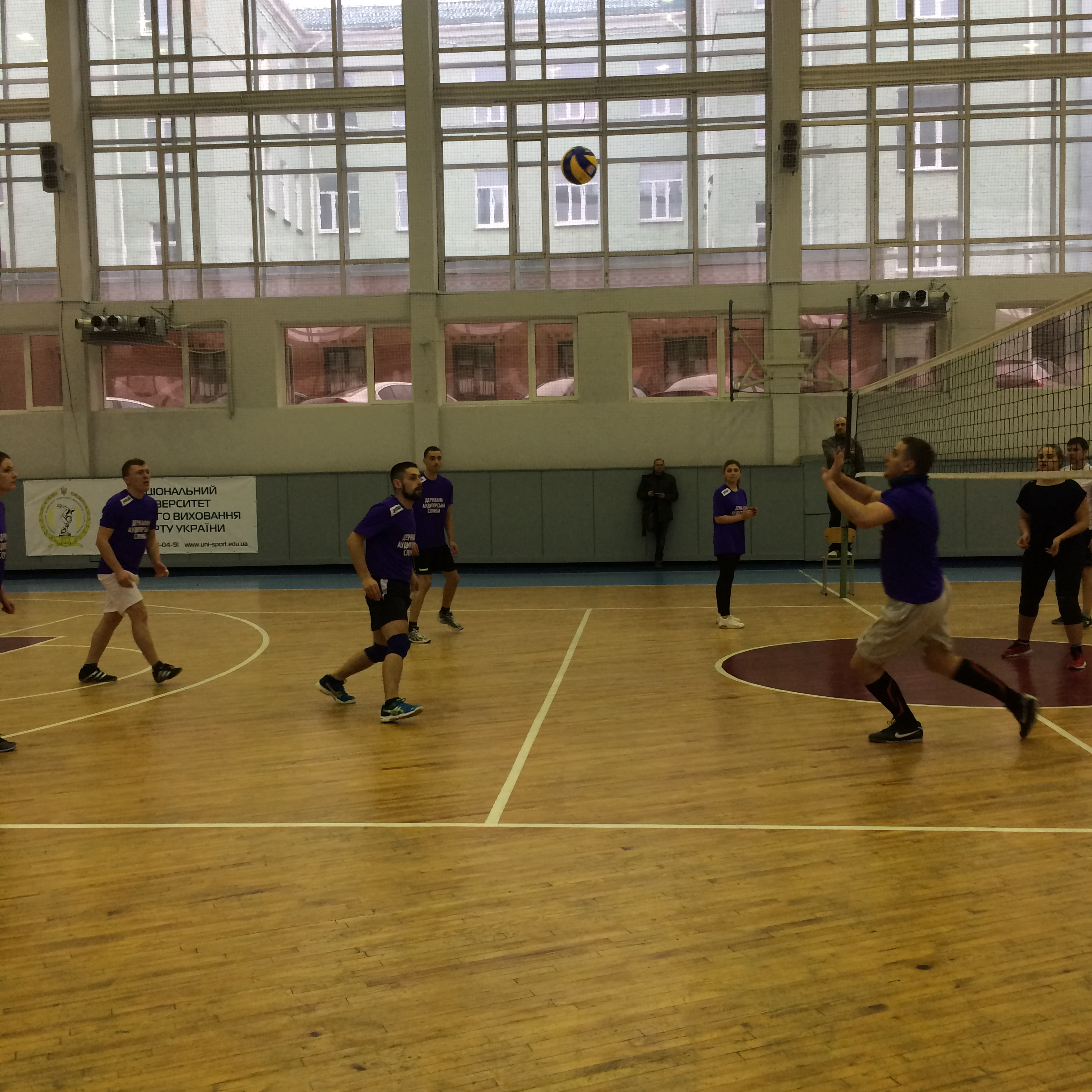 Змагання з волейболу на спартакіаді 2017 року